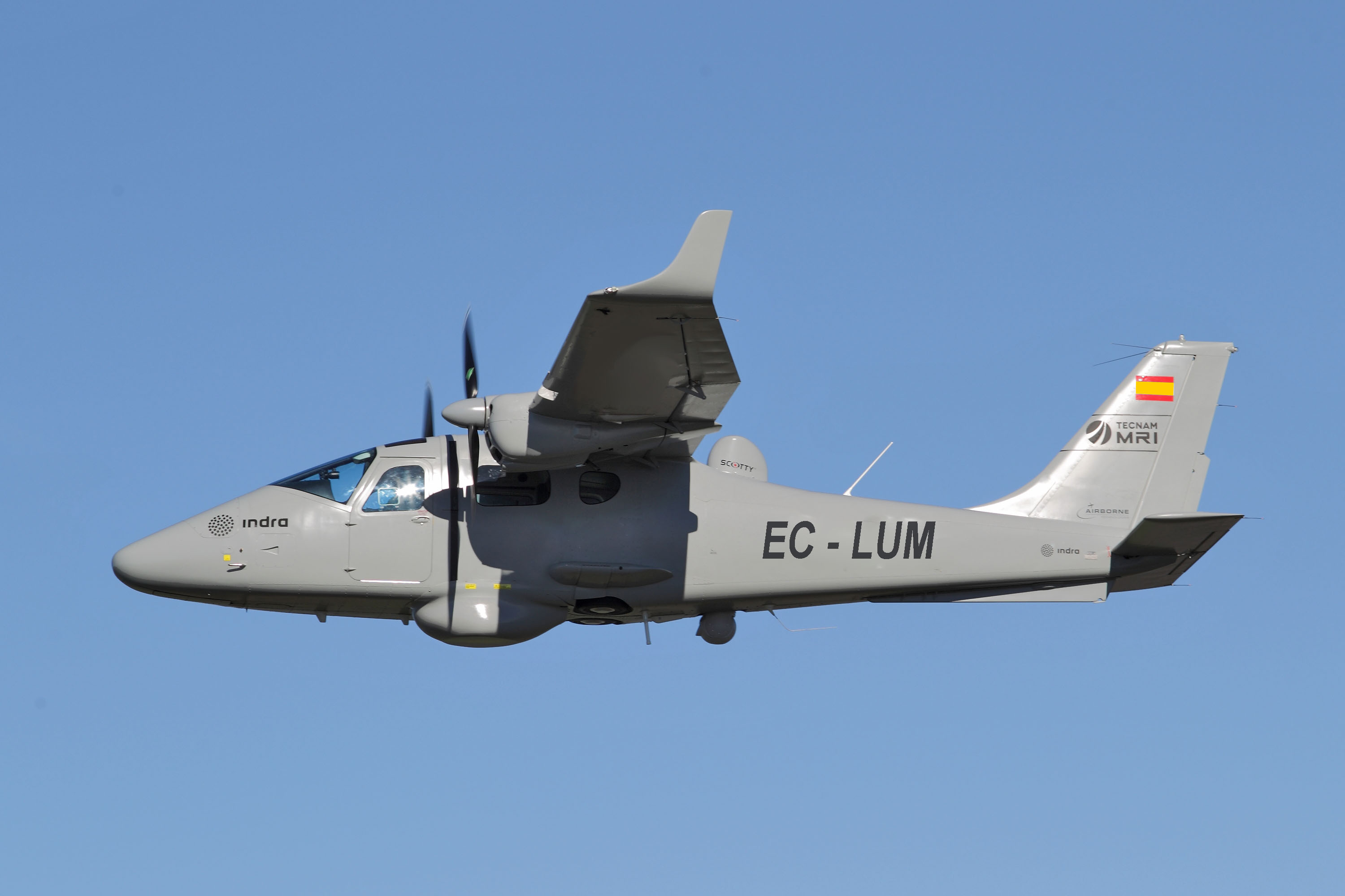 Un sistema de vigilancia que permite cubrir áreas marítimas de hasta 5.000 NM2 a distancias de 100 millas de la costa con un coste de adquisición similar al de un helicóptero ligero.